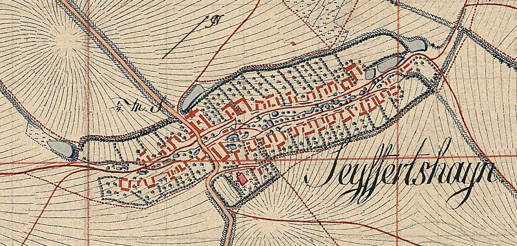 Karte von Seifertshain um 1800 (Ausschnitt aus Meilenblätter von Sachsen 1780-1806)